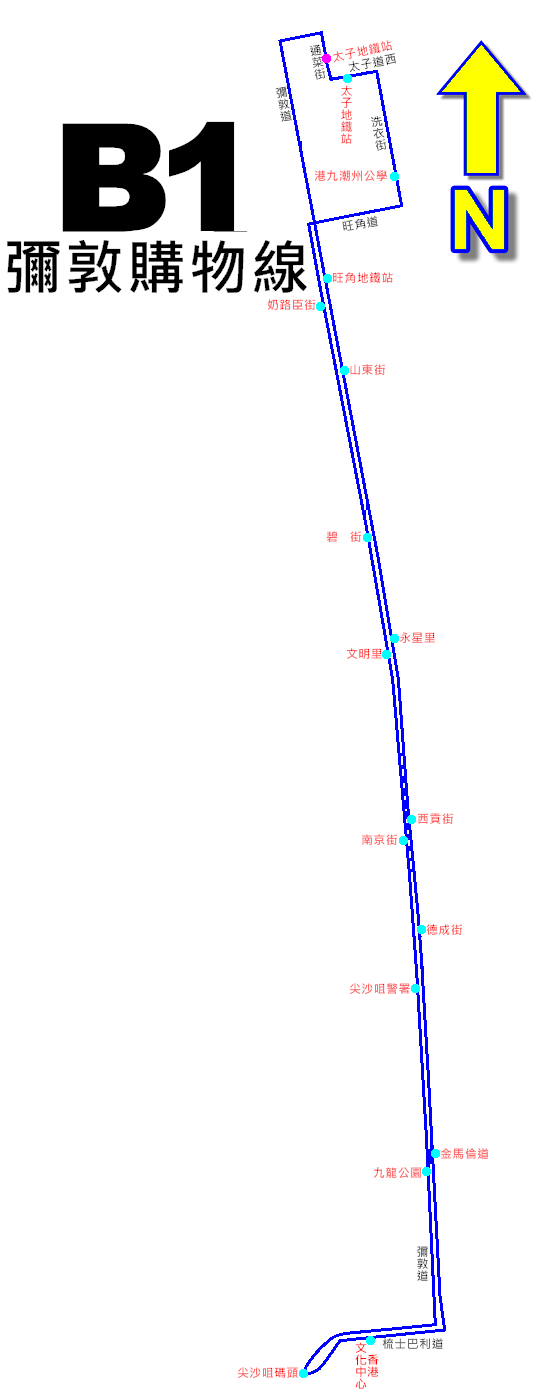 中文（香港）: 九巴B1線(彌敦循環線)的走線圖(2003年取消前)